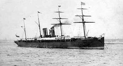 Alaska (1881-1902)